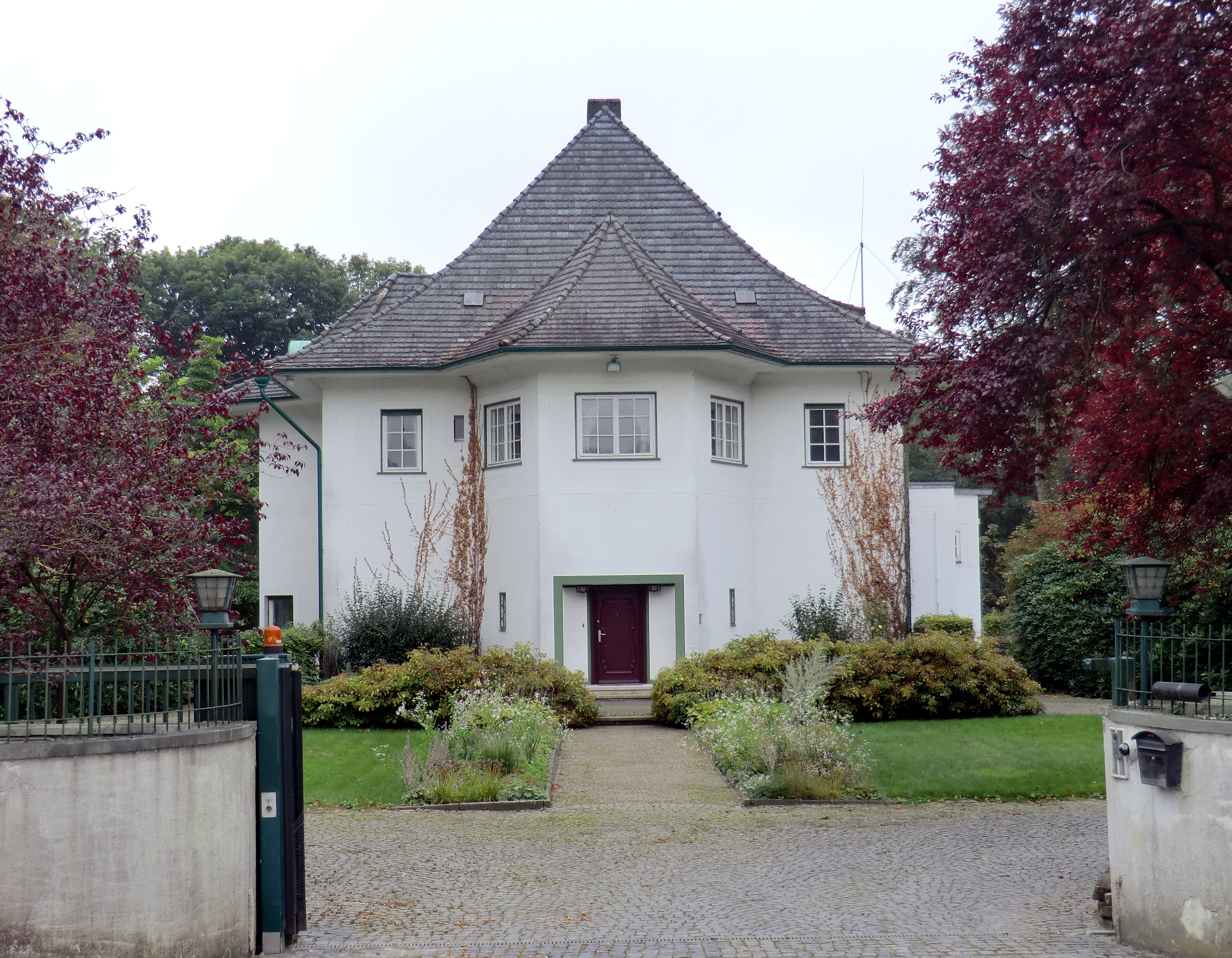 Denkmalgeschütztes Villengebäude Milchstraße 17 in Lippinghausen, Ortsteil von Hiddenhausen This is a photograph of an architectural monument.